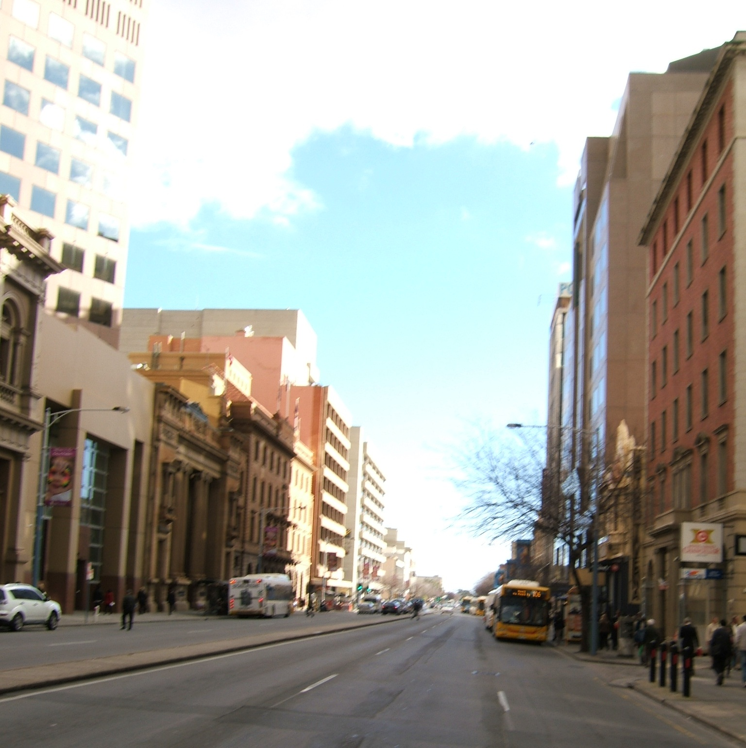 Currie St, Adelaide